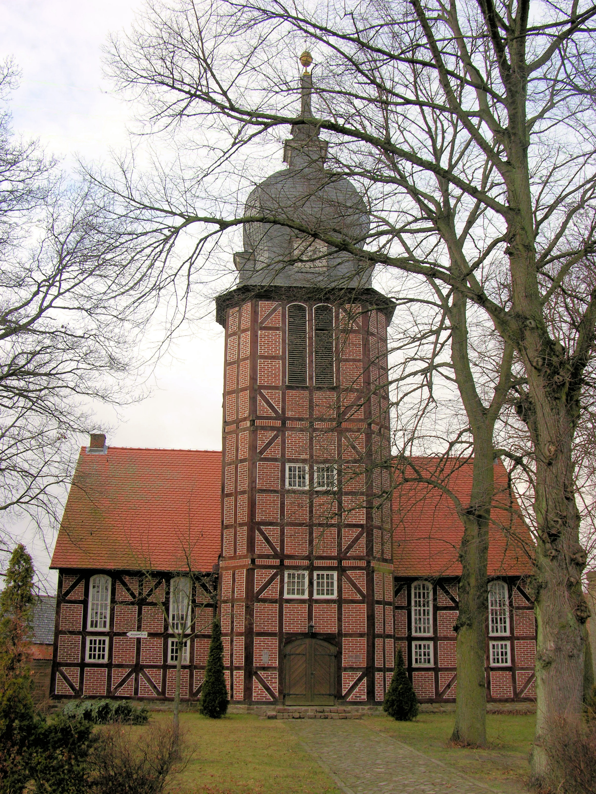 Kirche in Kusey (Altmark)